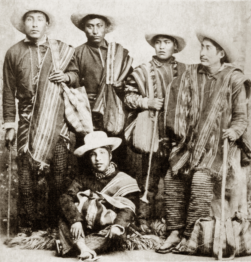 Bolivian Kallawayas in Panama, 1900.